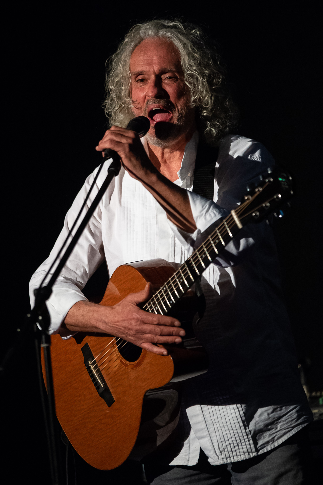 Concertbüro Franken,Franz Benton,Gutmann am Dutzendteich,Konzert,Livekonzert,Livemusik